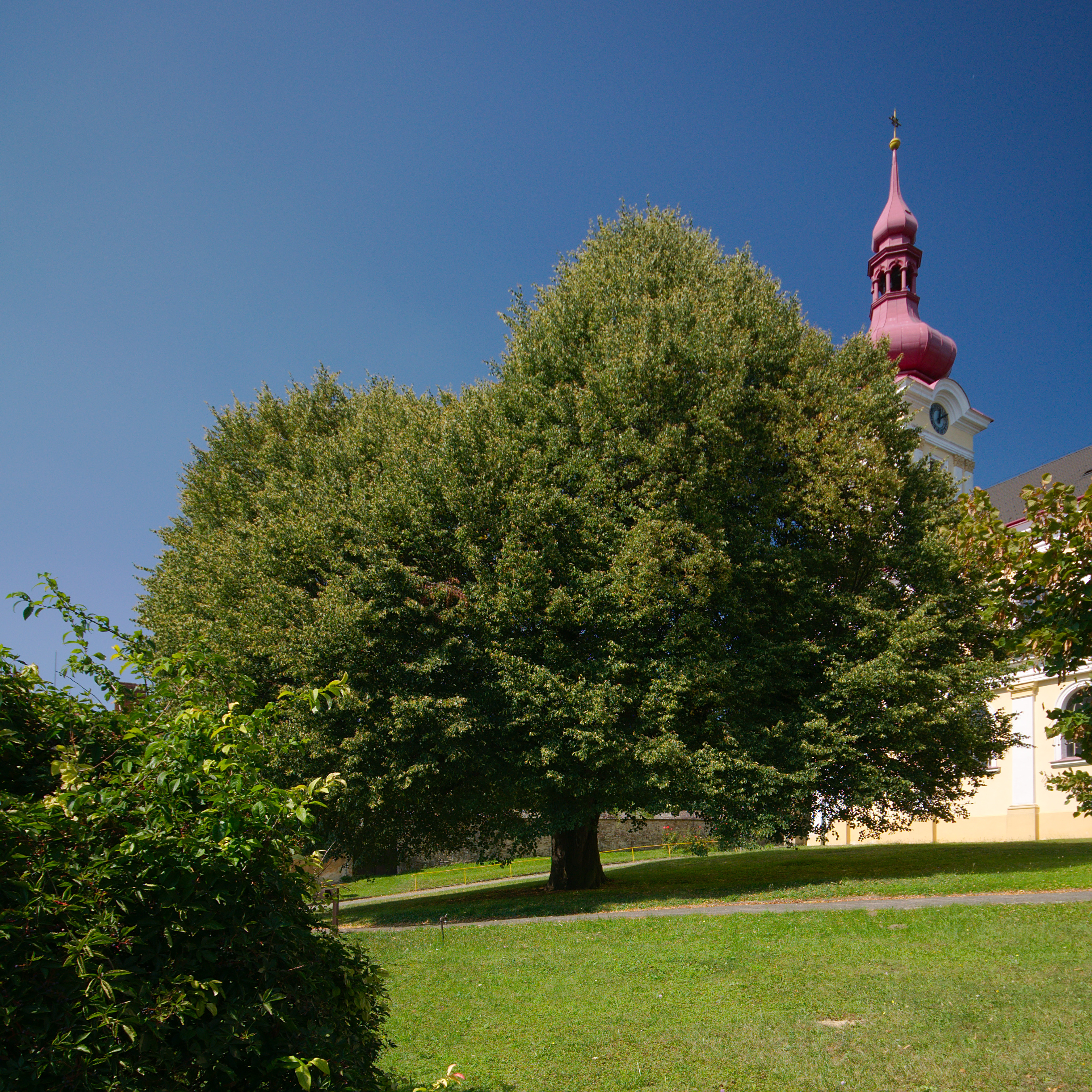 Pustiměřská lípa, Pustiměř, okres Vyškov